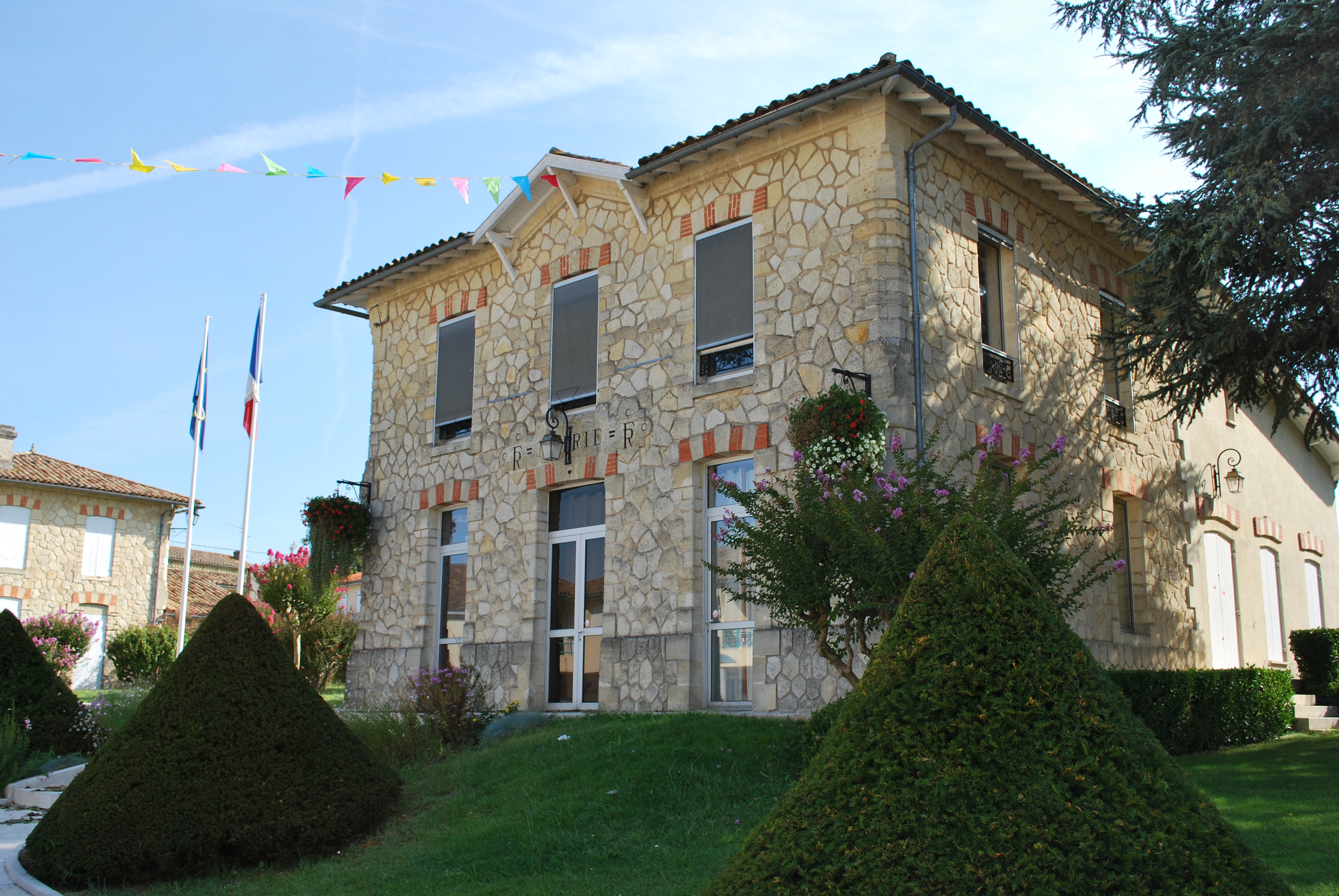 St Sulpice-de-Faleyrens Mairie